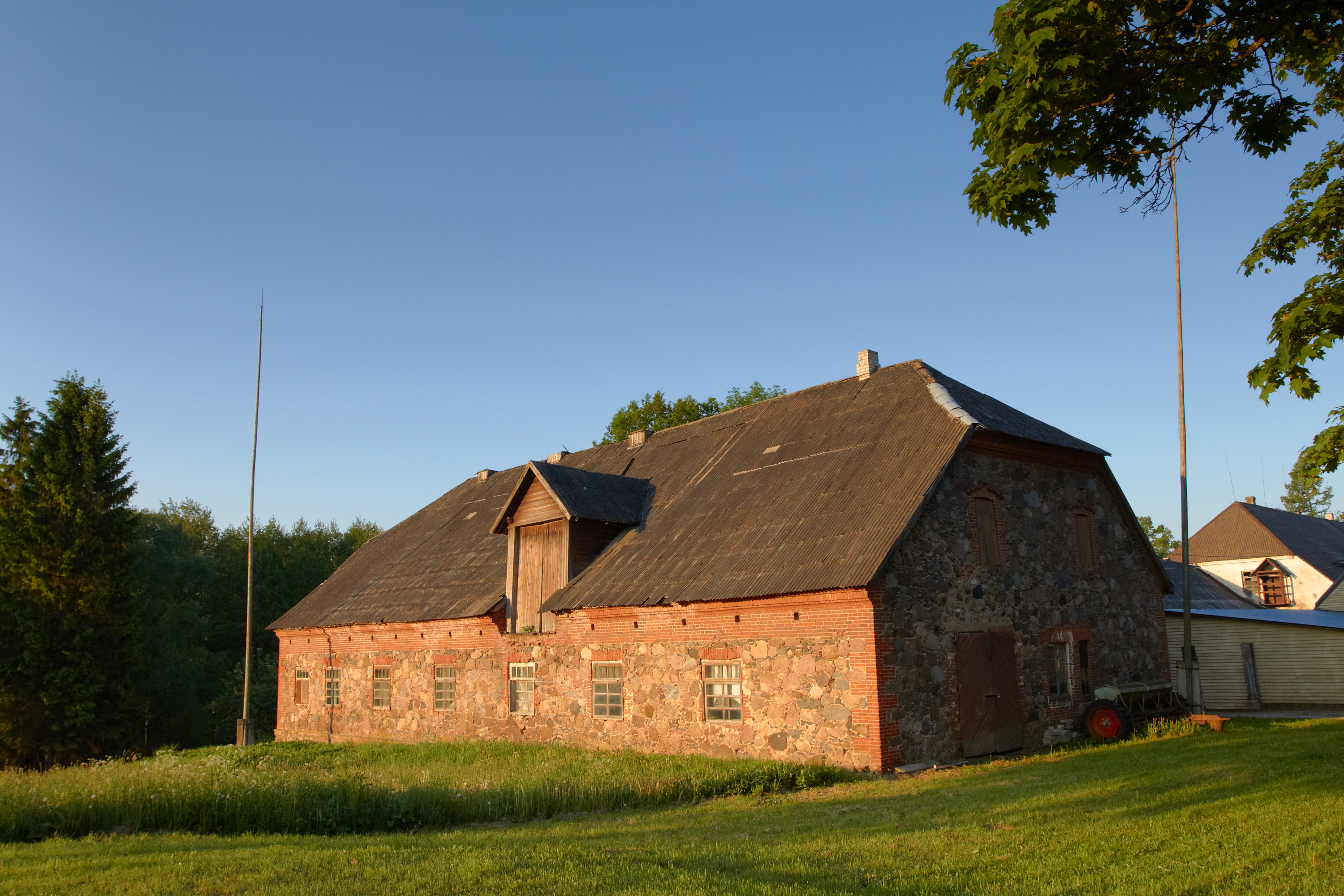 Väimela mõisa vankrikuur